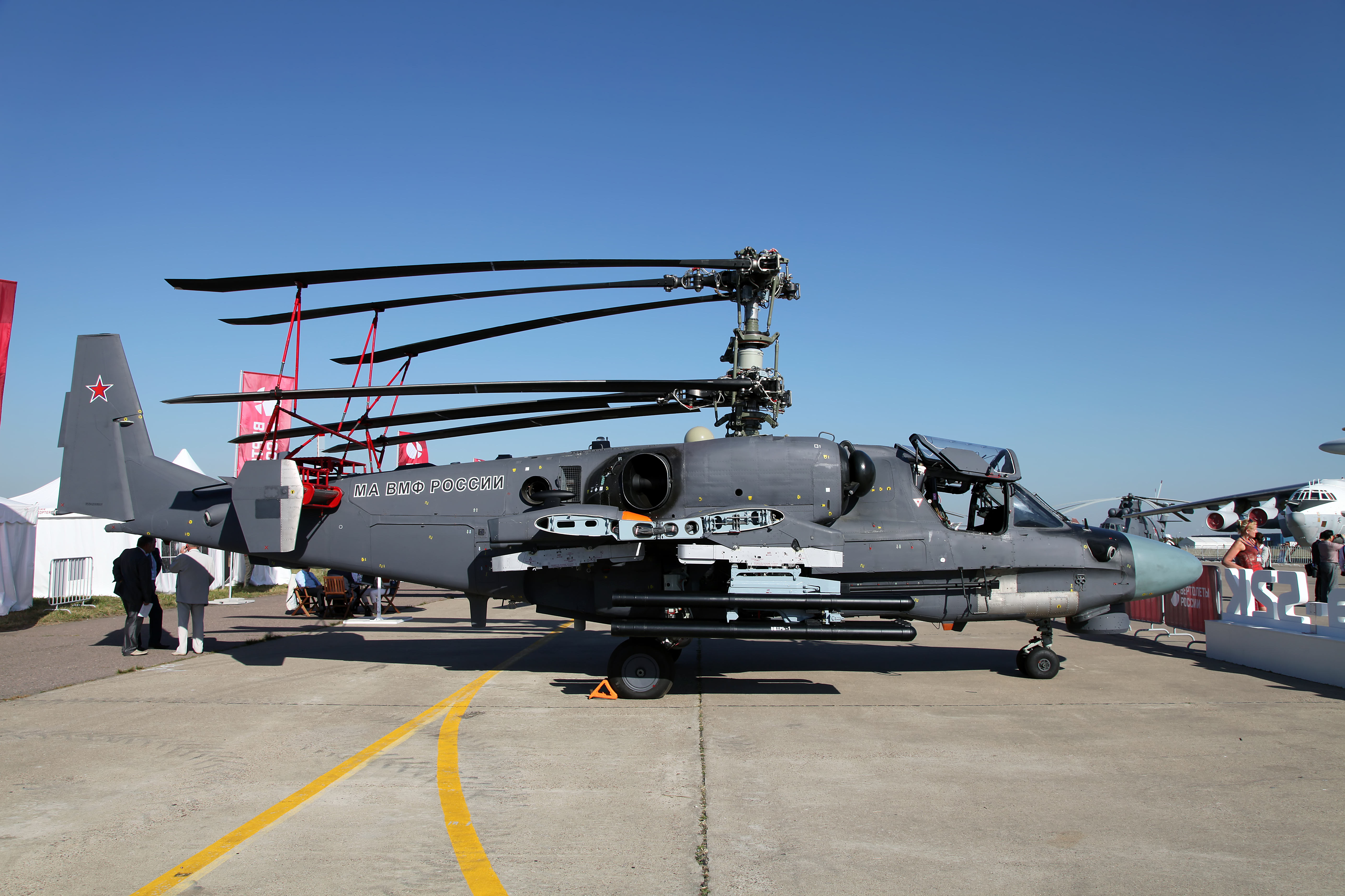 Ka-52K